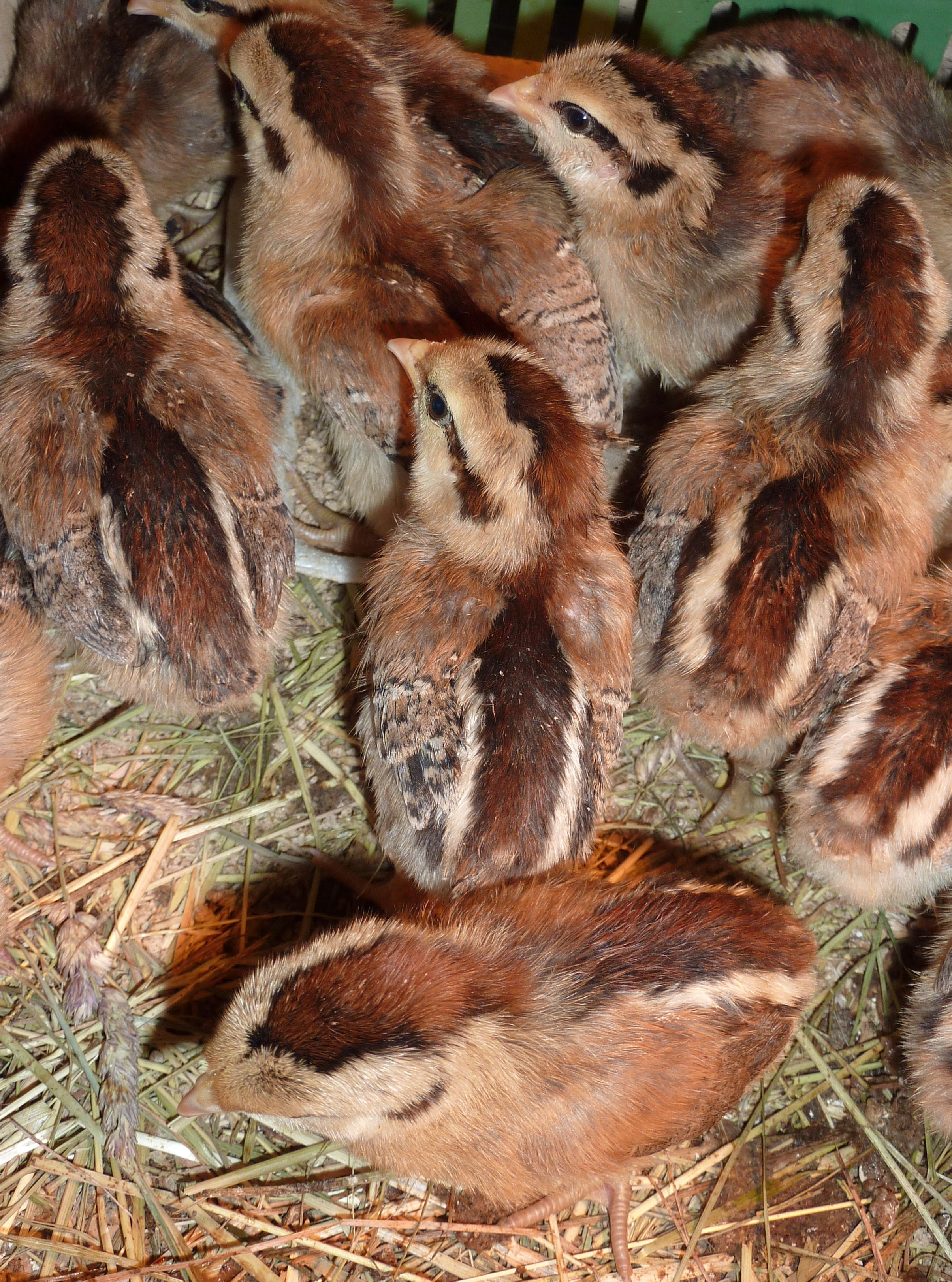 Trzydniowe pisklęta zielononóżek